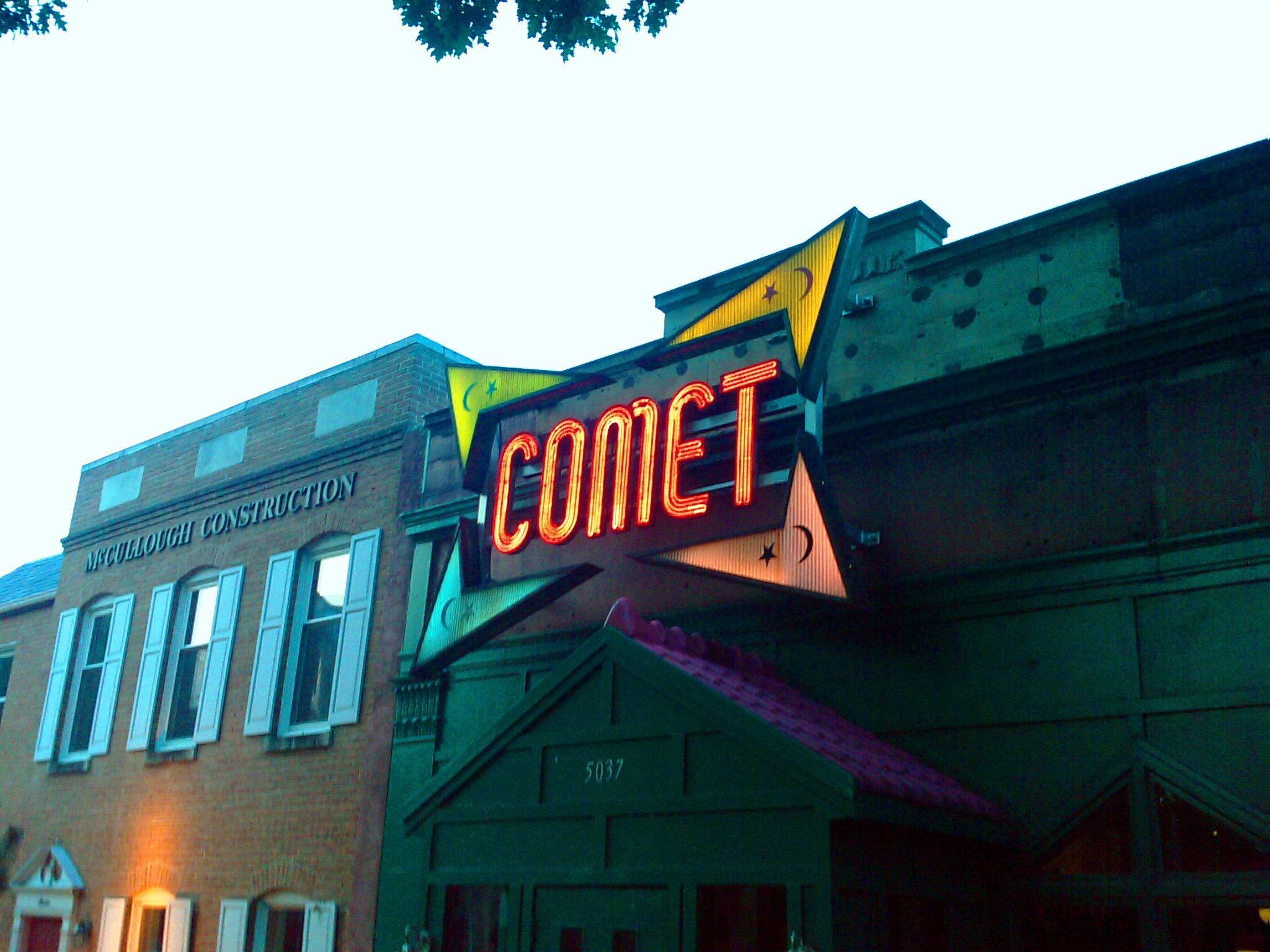 Comet - NW DC